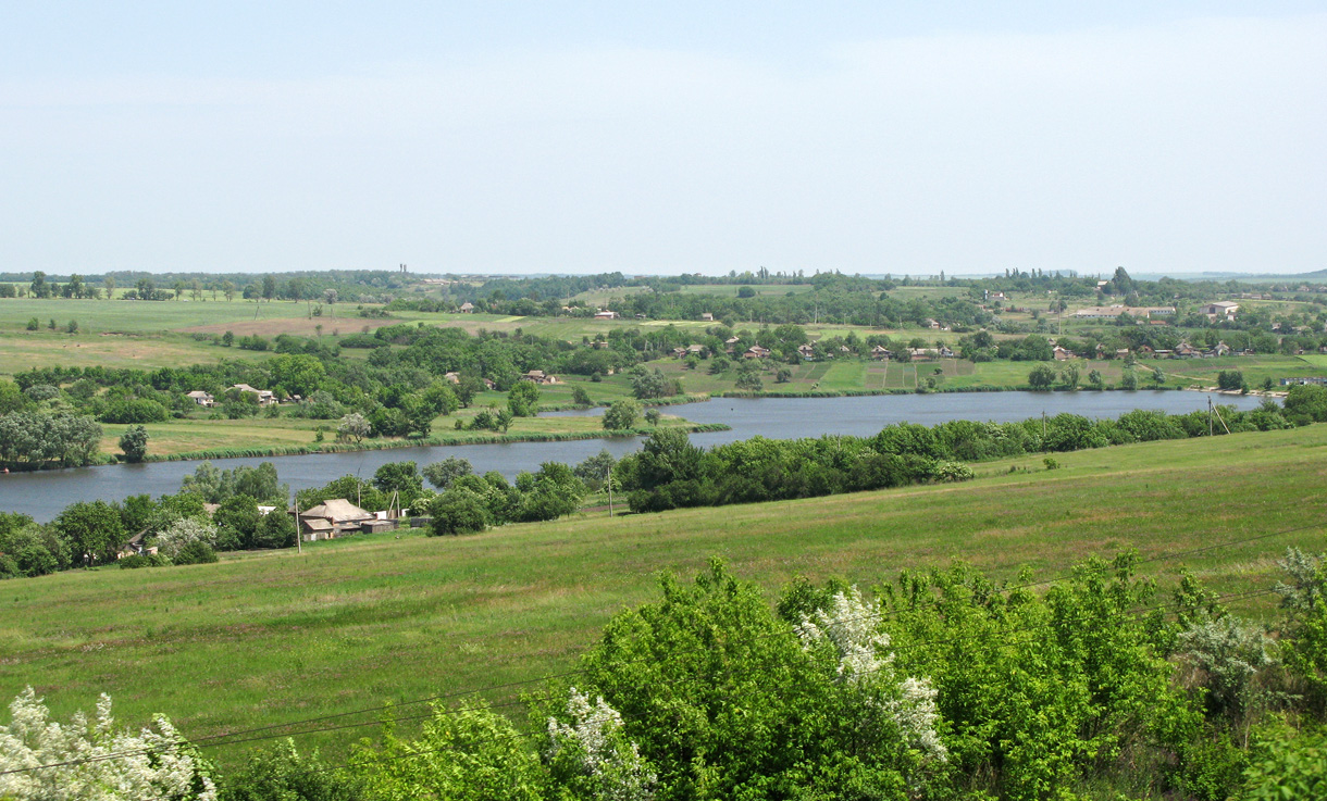 Река Ингулец в селе Цибулево, Знаменский район Кировоградской области